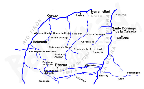 Esto es lo que podría ser el germen de la región de Rioja, según la teoría de D. Tomás Ramirez Pascual